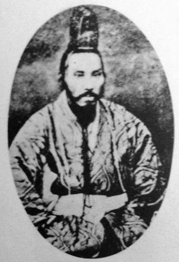 a Japanese man 副島種臣 (Taneomi Soejima)